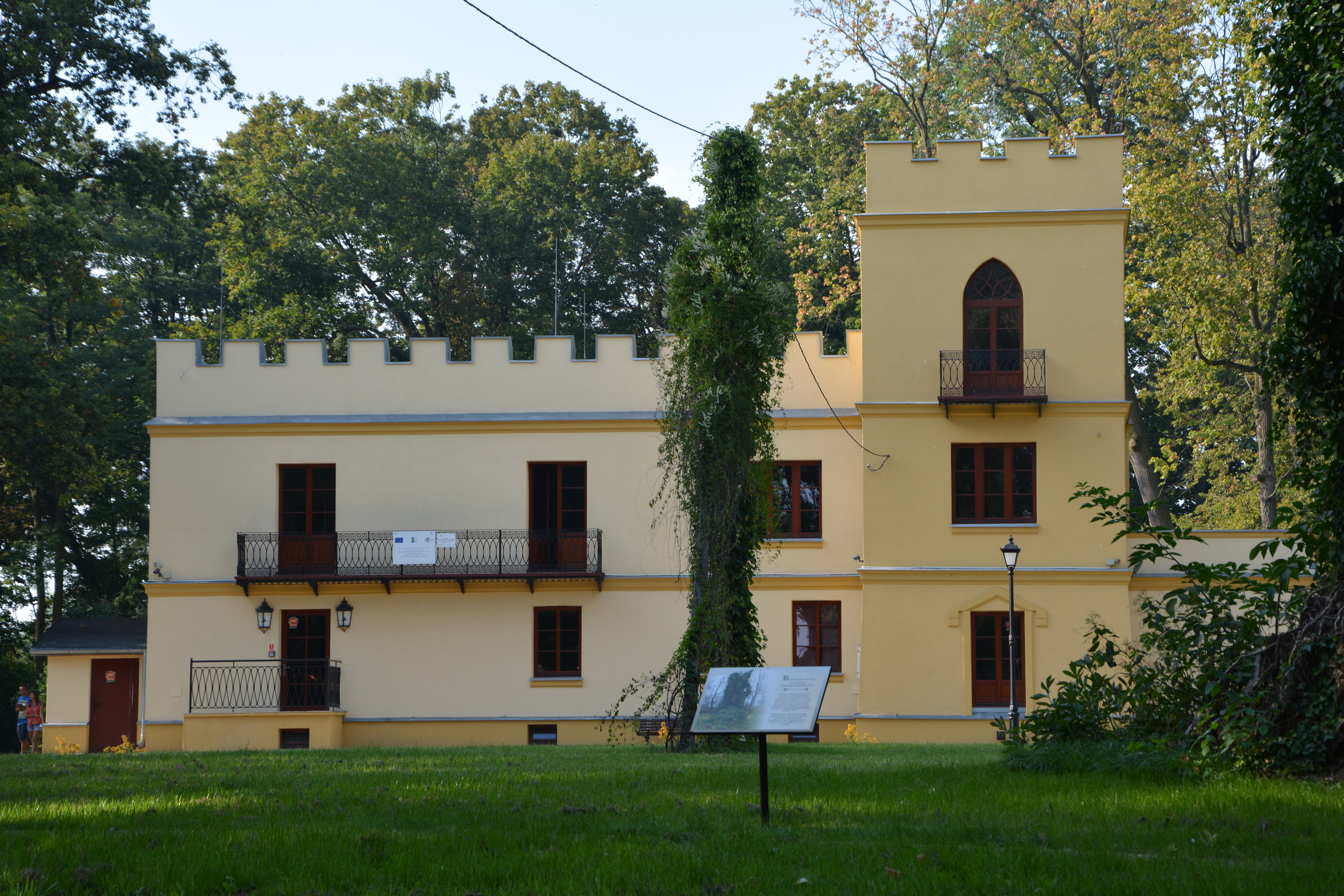 Romantyczny zameczek w parku w Łaniętach (woj. łódzkie)